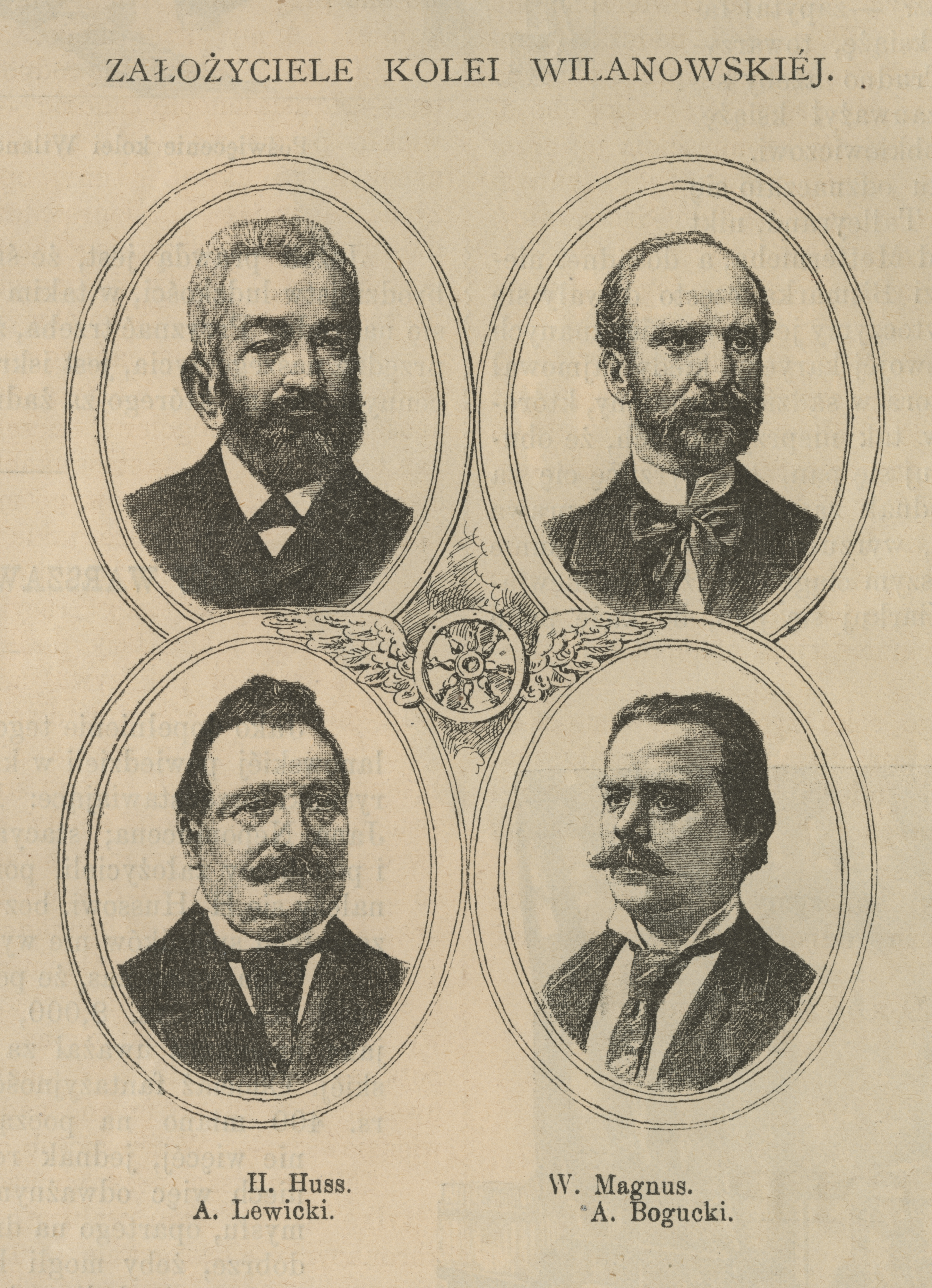 Założyciele Kolei Wilanowskiej : H. Huss, A. Lewicki, W. Magnus, A. Bogucki